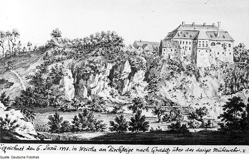 Original image description from the Deutsche Fotothek Weißenberg-Gröditz. Ortsansicht, nach Zeichnung von 1775